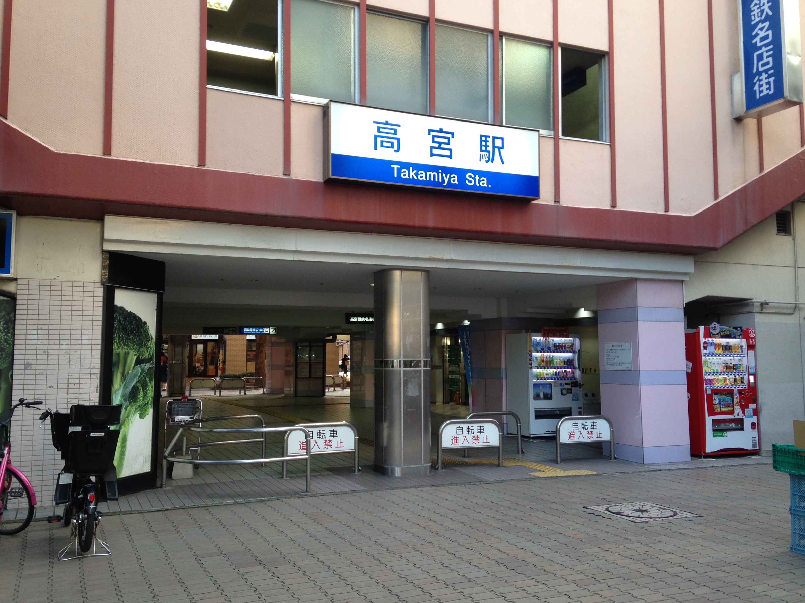 高宮駅東口